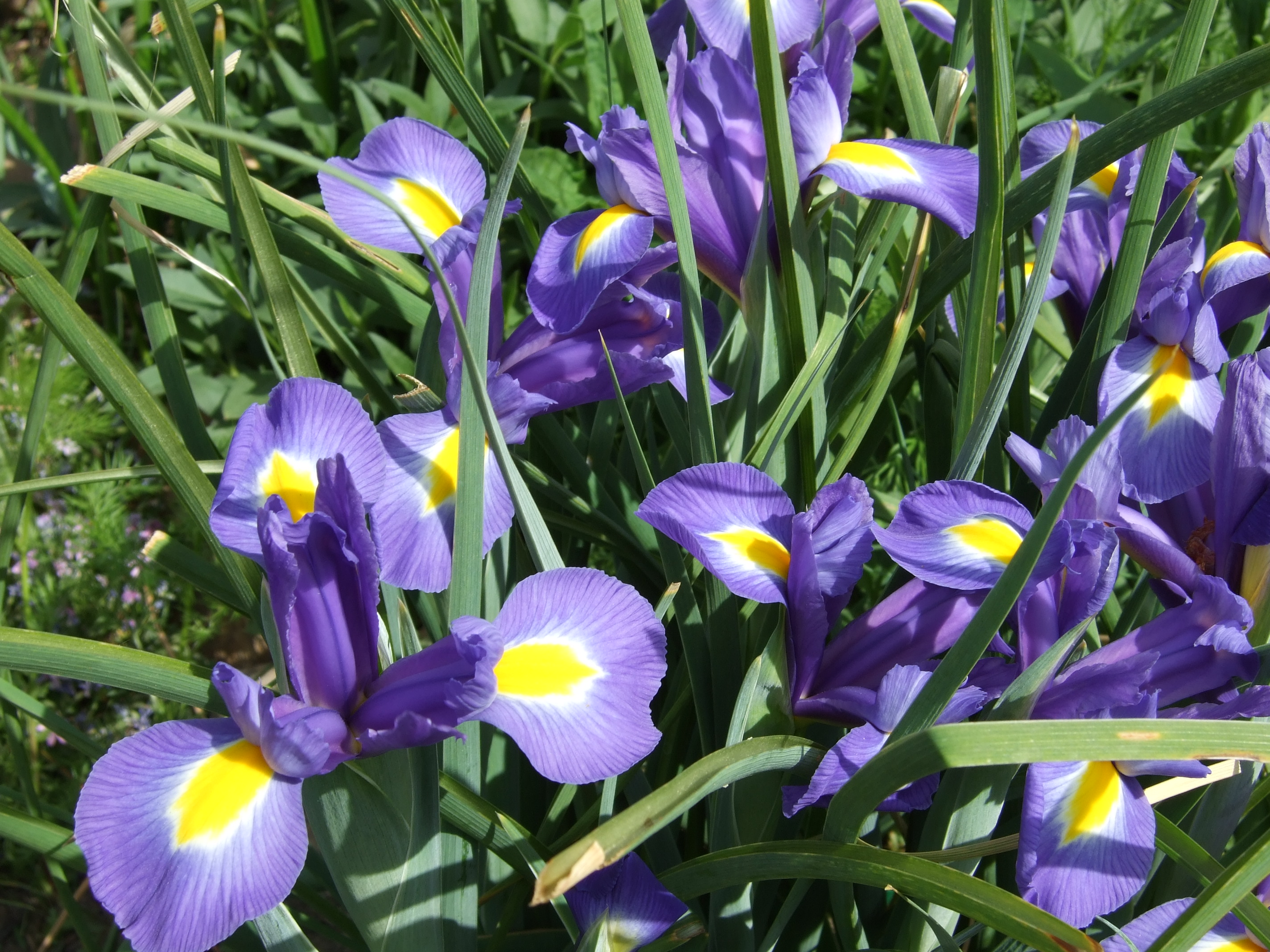 Blühende Schwertlilien (Iris spec., Züchtung)